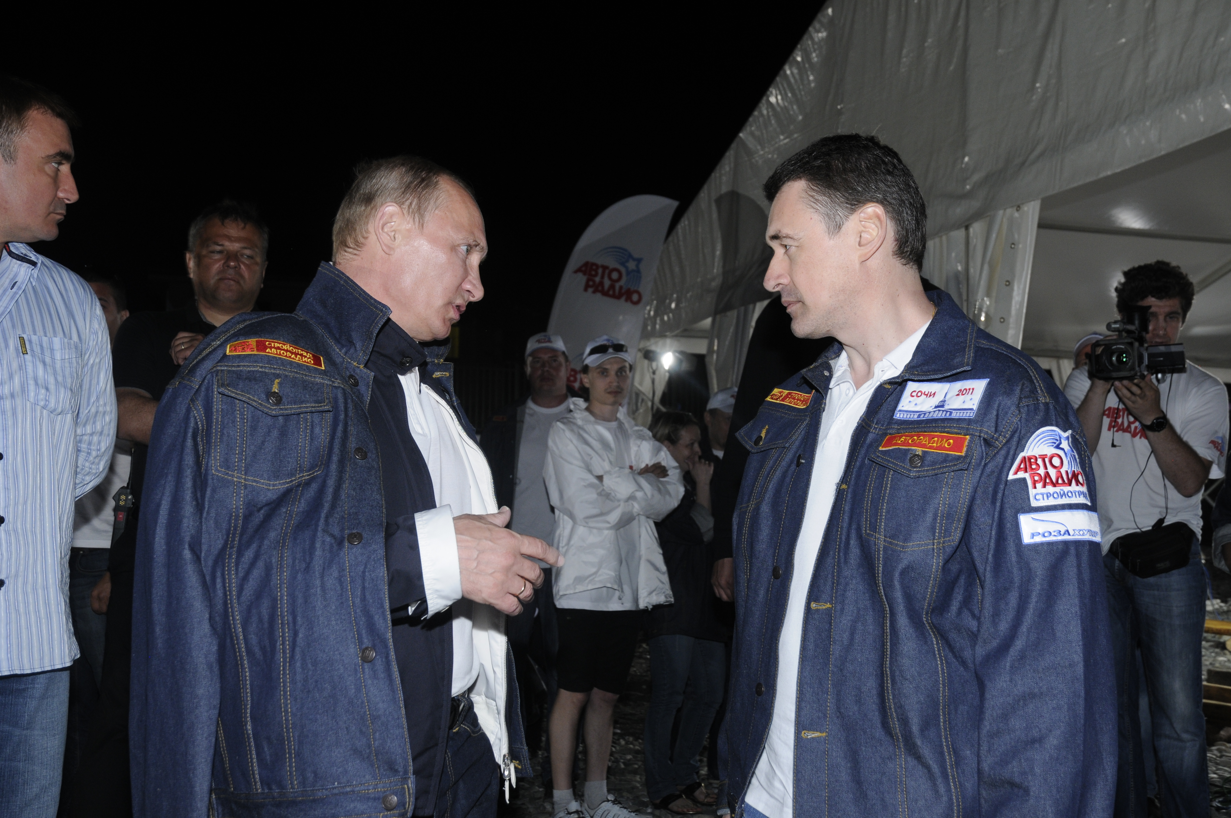 Проект Стройотряд Авторадио